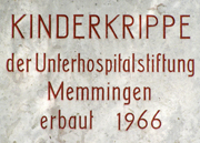 Unterhospital Memmingen - Eingang zum Kinderhort